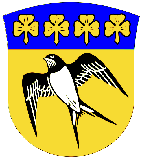 Shield of Gladsaxe Municipality (2007)